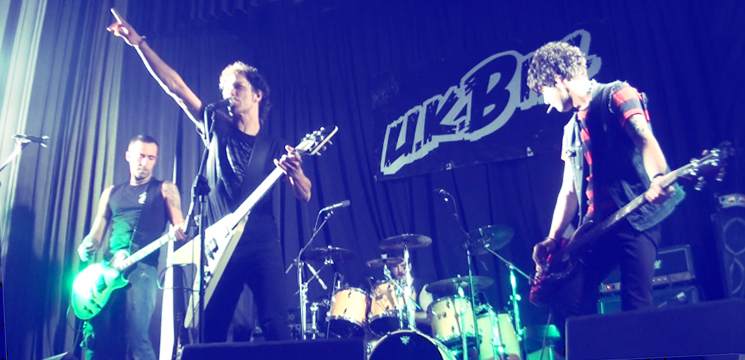 Donostia